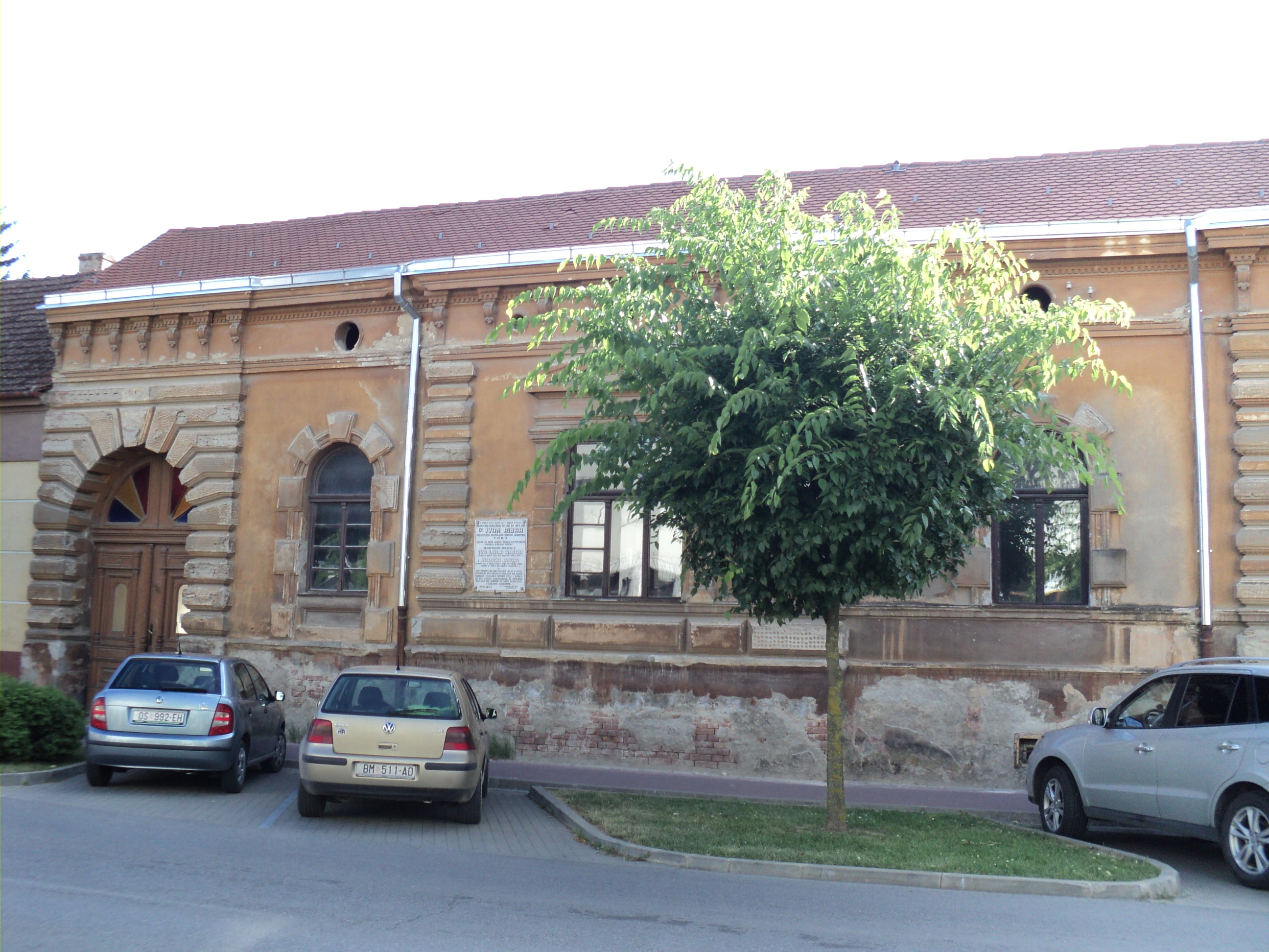 Kuća dr. Ivana Ribara u Đakovu. Self-made. Jul 2011.